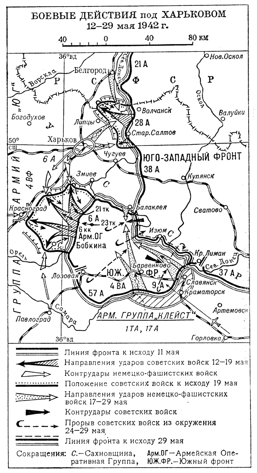 Bản đồ chiến dịch Barvenkovo-Lozovskaya(1)